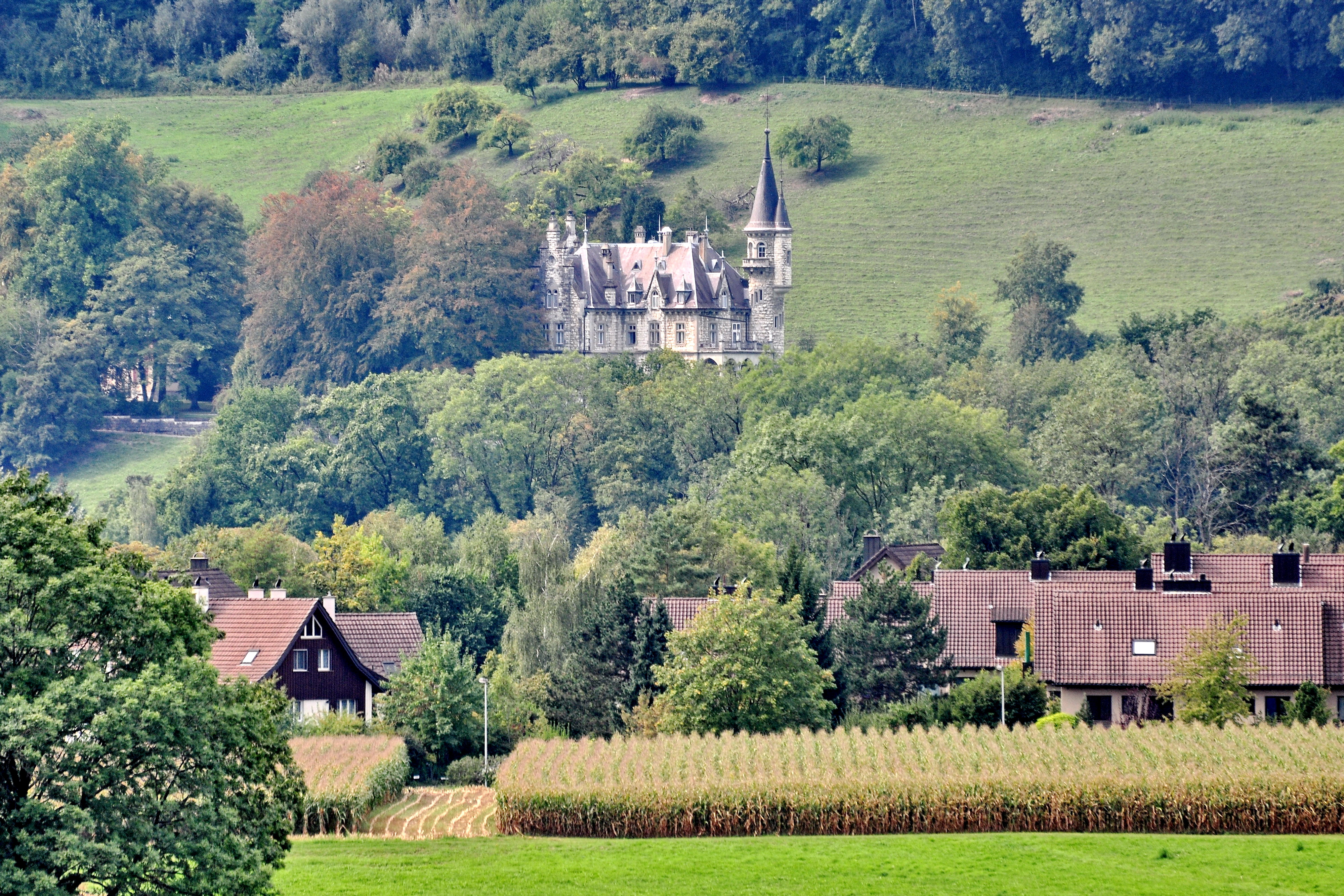 Schloss Wart mit Nebengebäuden und Park, Wartgutstrasse 80 in Neftenbach (Switzerland)